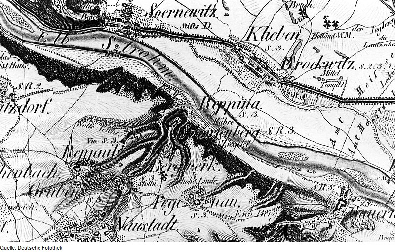 Original image description from the Deutsche Fotothek Klipphausen-Scharfenberg. Oberreit, Sect. Dresden, 1821/22